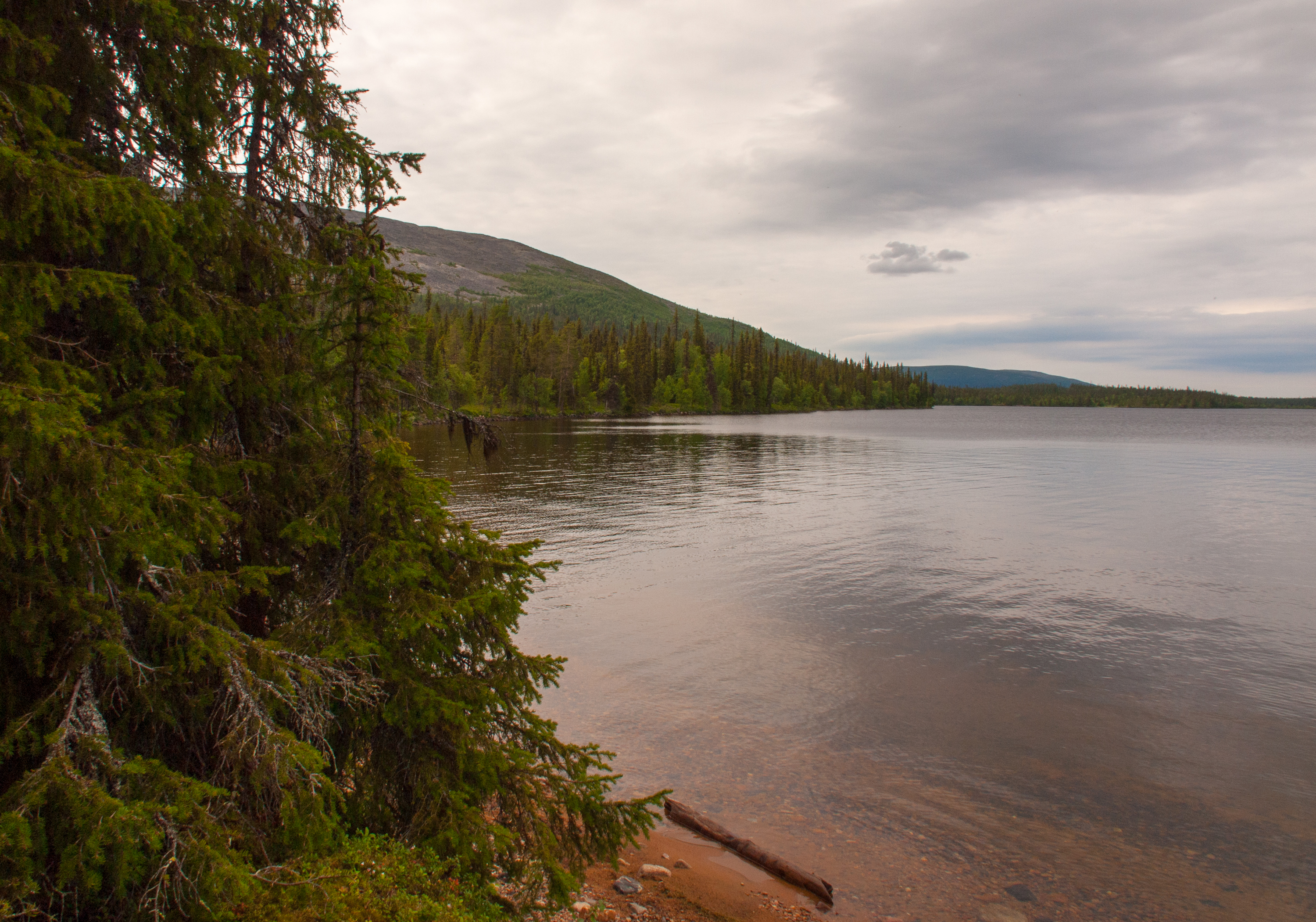 Pallasjärvi